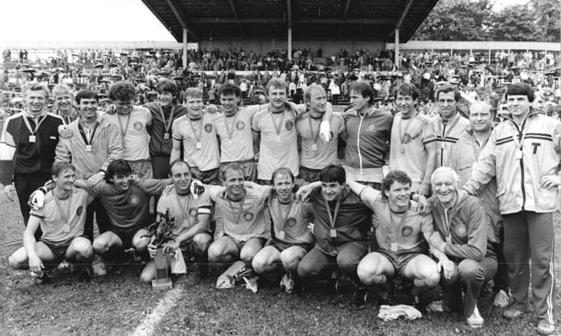 ADN-ZB-Settnik-31.5.86-zin-Berlin: 35. Endspiel um den FDGB-Fußball-Pokal 1. FC Lok Leipzig - 1. FC Union Berlin 5:1 (1:0). Nach dem klaren Pokaltriumph vor 50 000 Zuschauern im Stadion der Weltjugend stellten sich die Spieler des 1. FC Lok Leipzig den Fotoreportern zum Mannschaftsfoto. Vordere Reihe 3. v.l. Mannschaftskapitän Frank Baum mit der begehrten Trophäe.